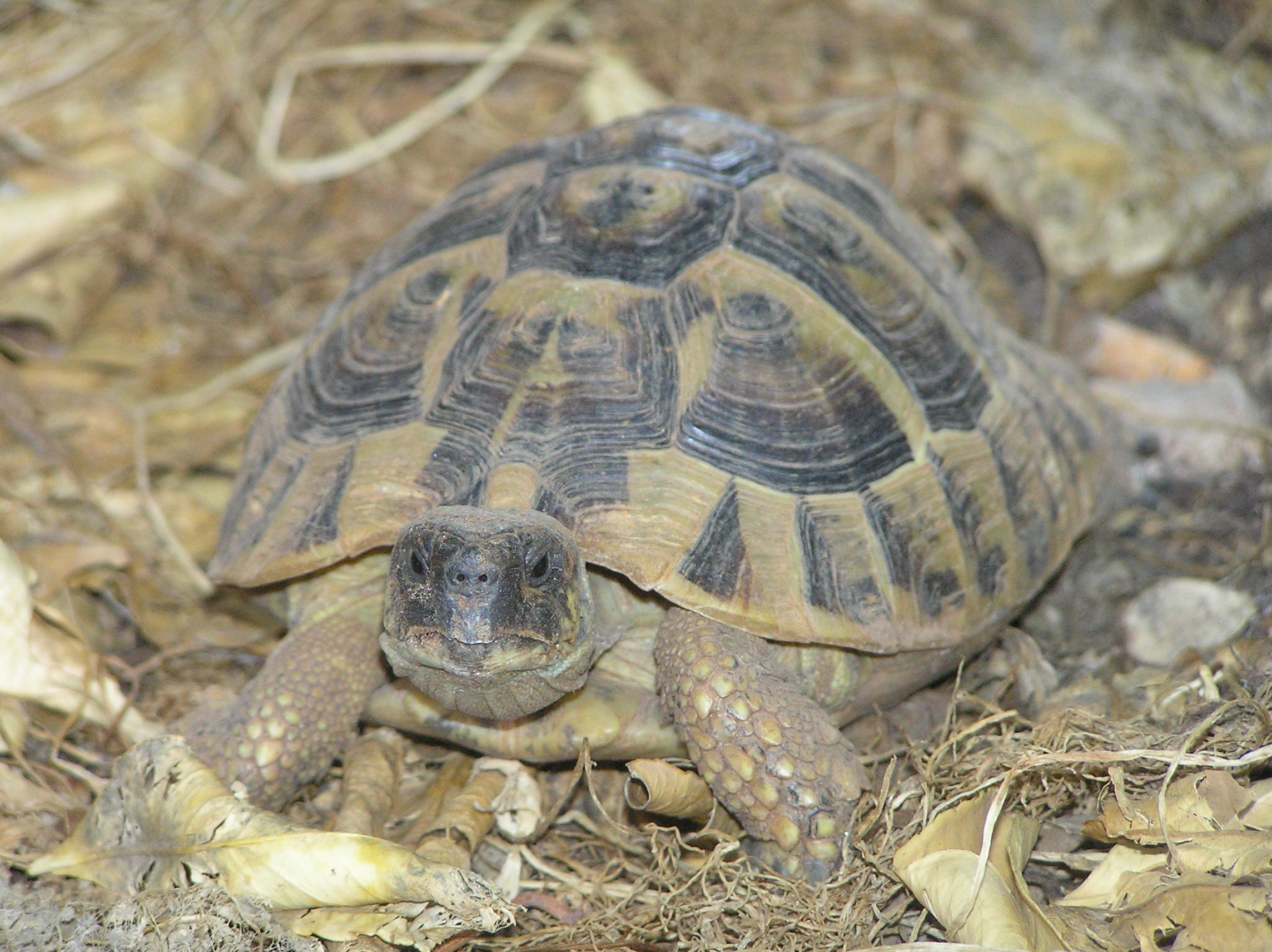 Testudo